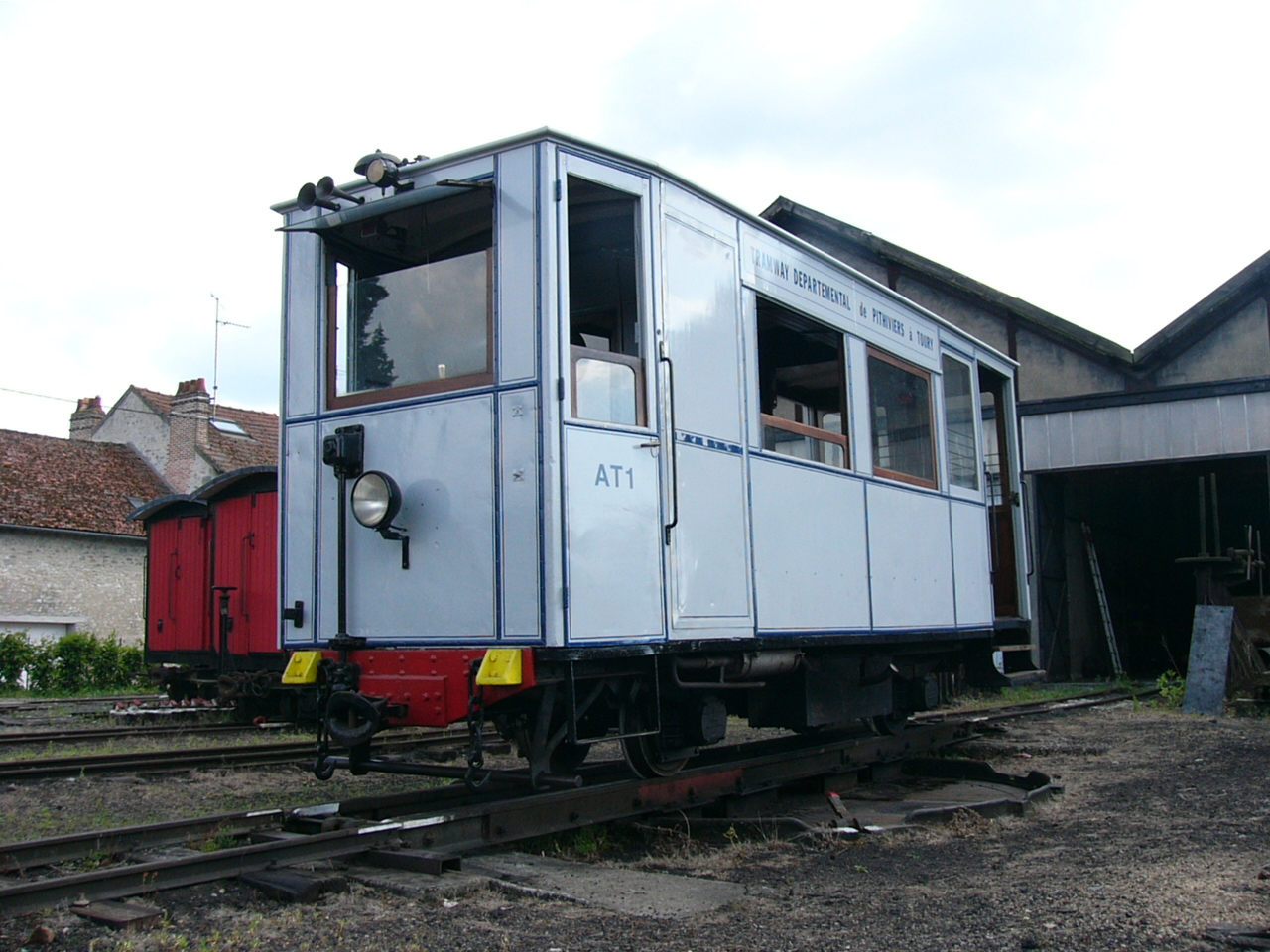 Automotrice pétroléo-électrique 020 Crochat à la gare musée de Pithiviers